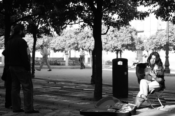 A street musician in Sevilla. Músico en el Patio de Banderas (Sevilla).